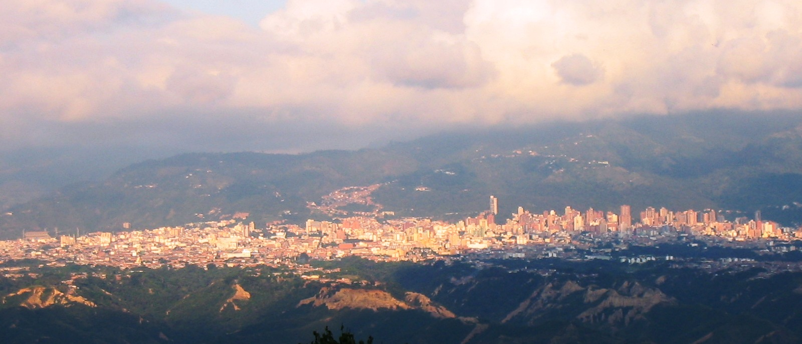 Panorámica de la ciudad de Bucaramanga, Colombia